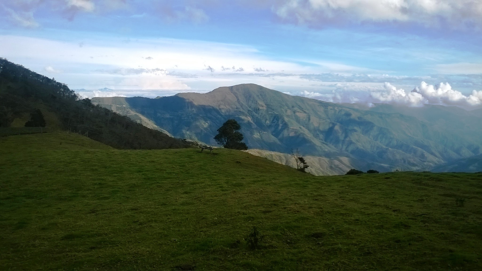 Paisaje natural en la vereda Monterredondo (Jambaló - Cauca)